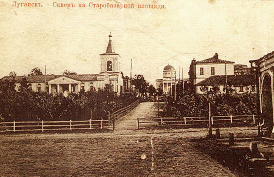 Успенская церковь и сквер. Церковь разрушена в 1924 году. Теперь сквер Революции (Луганск)